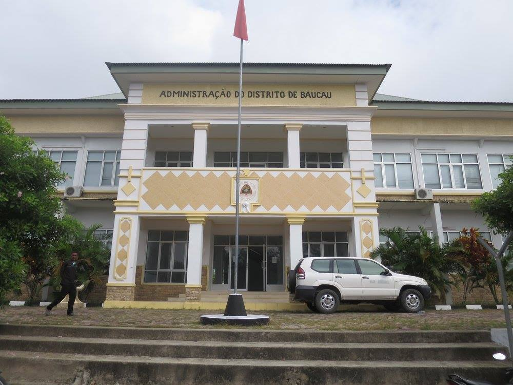 Sede do Municipio de Baucau